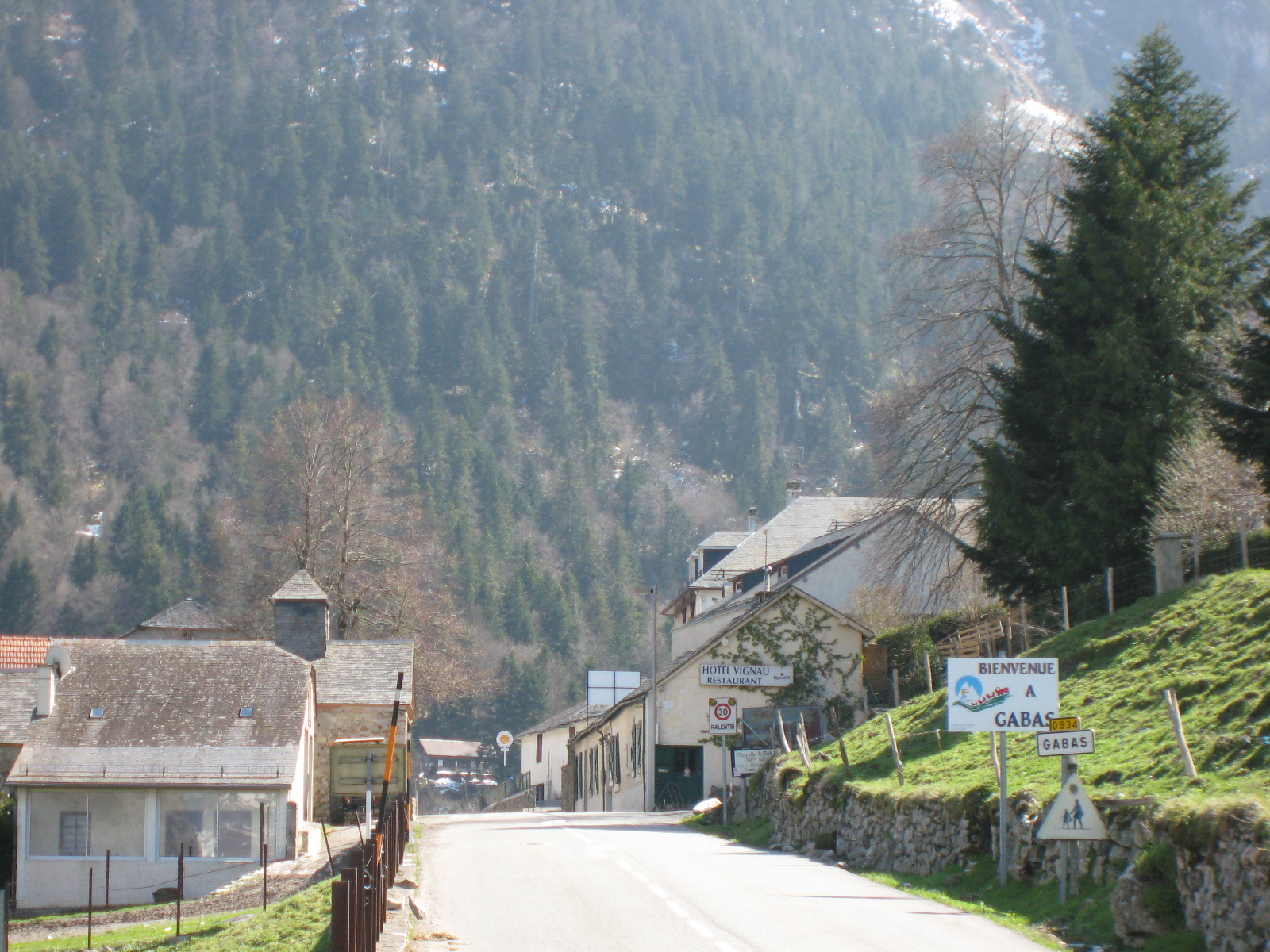 Village de Gabas (Pyrénées-Atlantiques) (Pyrénées).